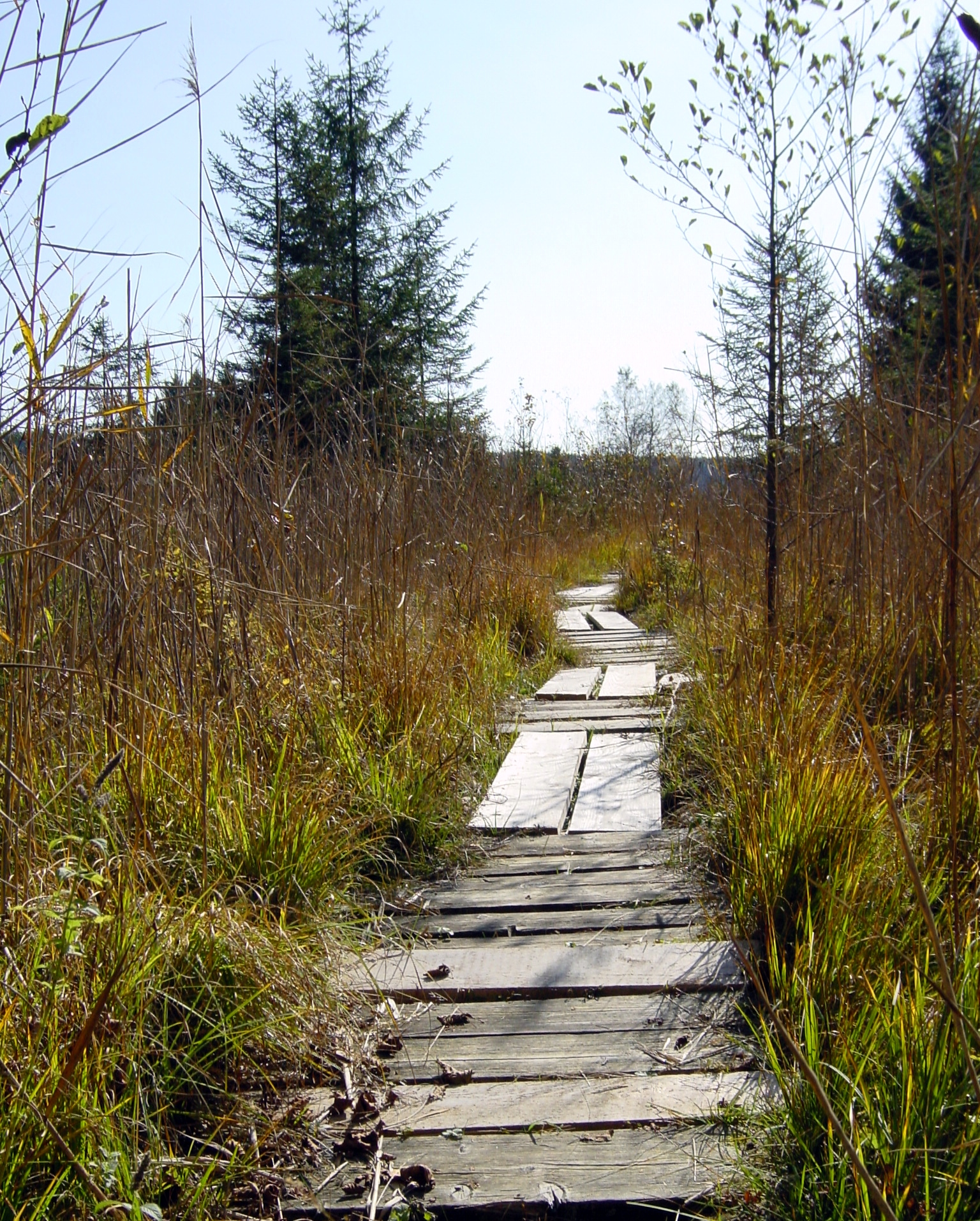 Uferzone am Maisinger See